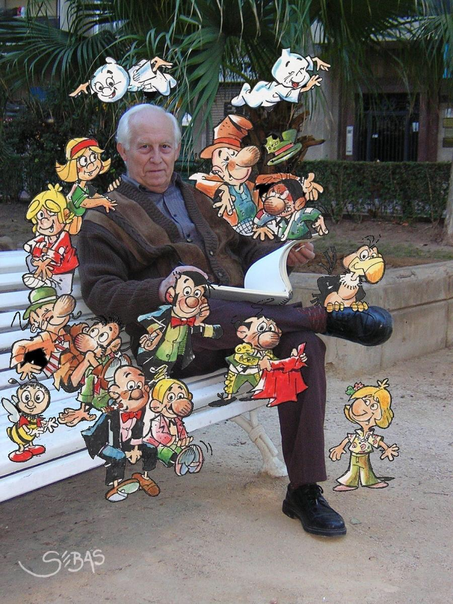 Fotografía del dibujante Arturo Rojas de la Cámara con sus personajes más populares.